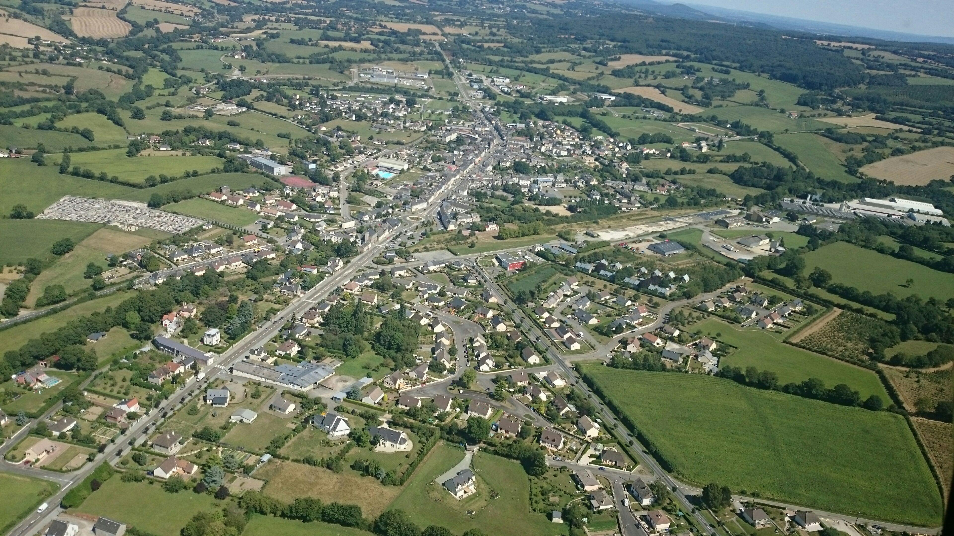 vue aérienne